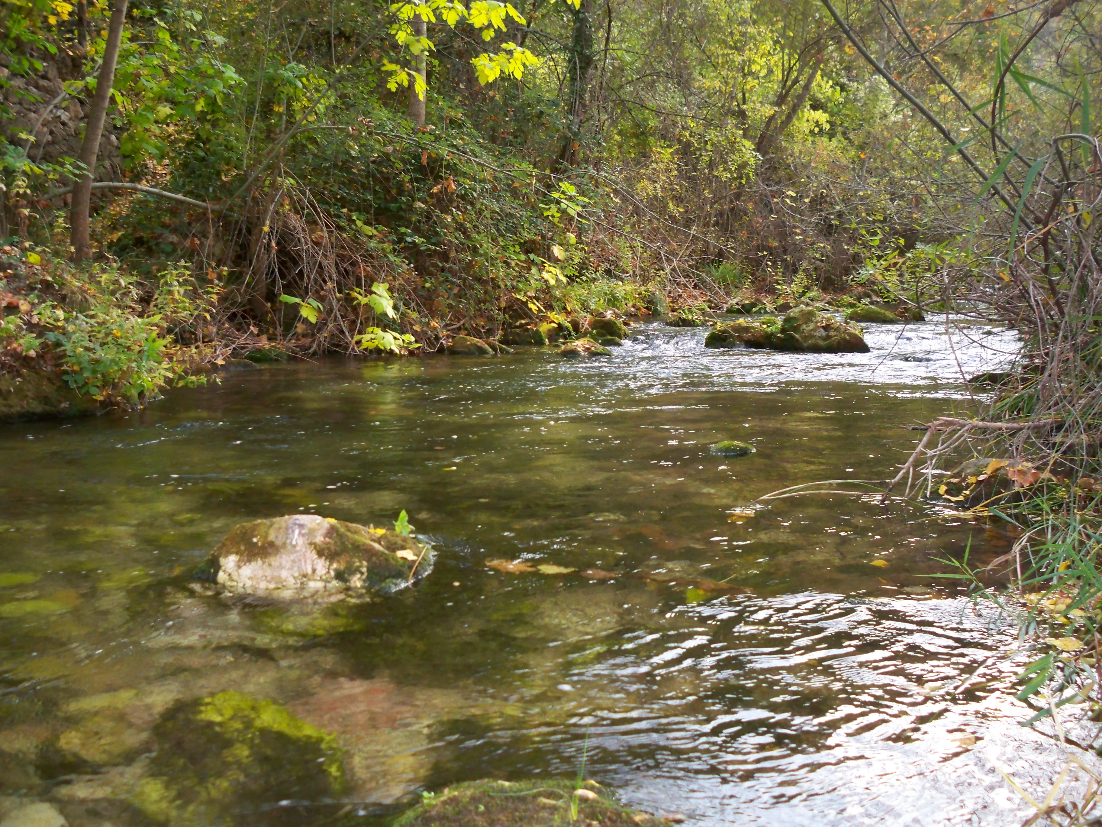 Fotografía del río Mundo a su paso por la localidad de Los Alejos (Molinicos - Albacete)